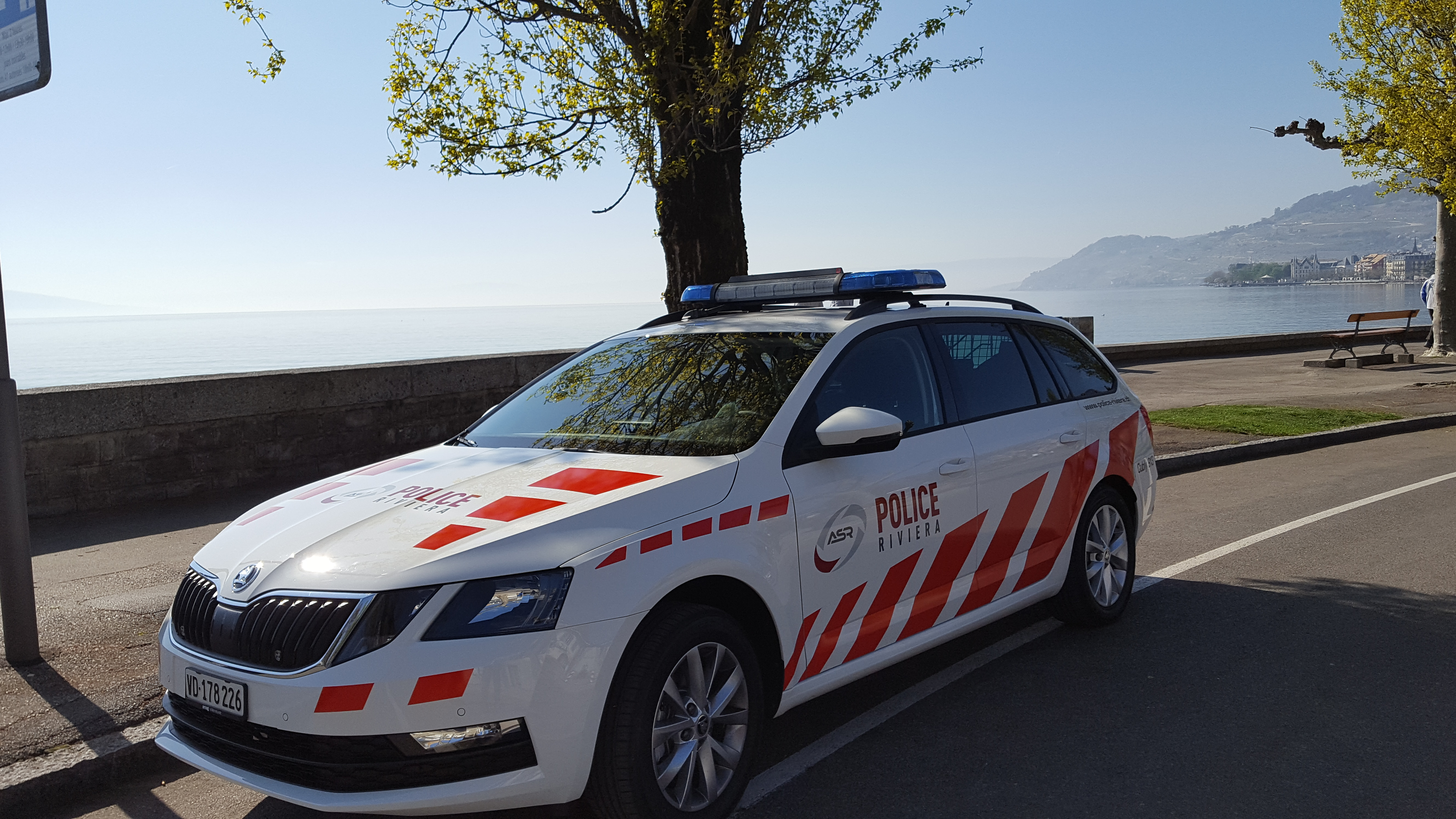 Streifenwagen der Police Riviera in Vevey